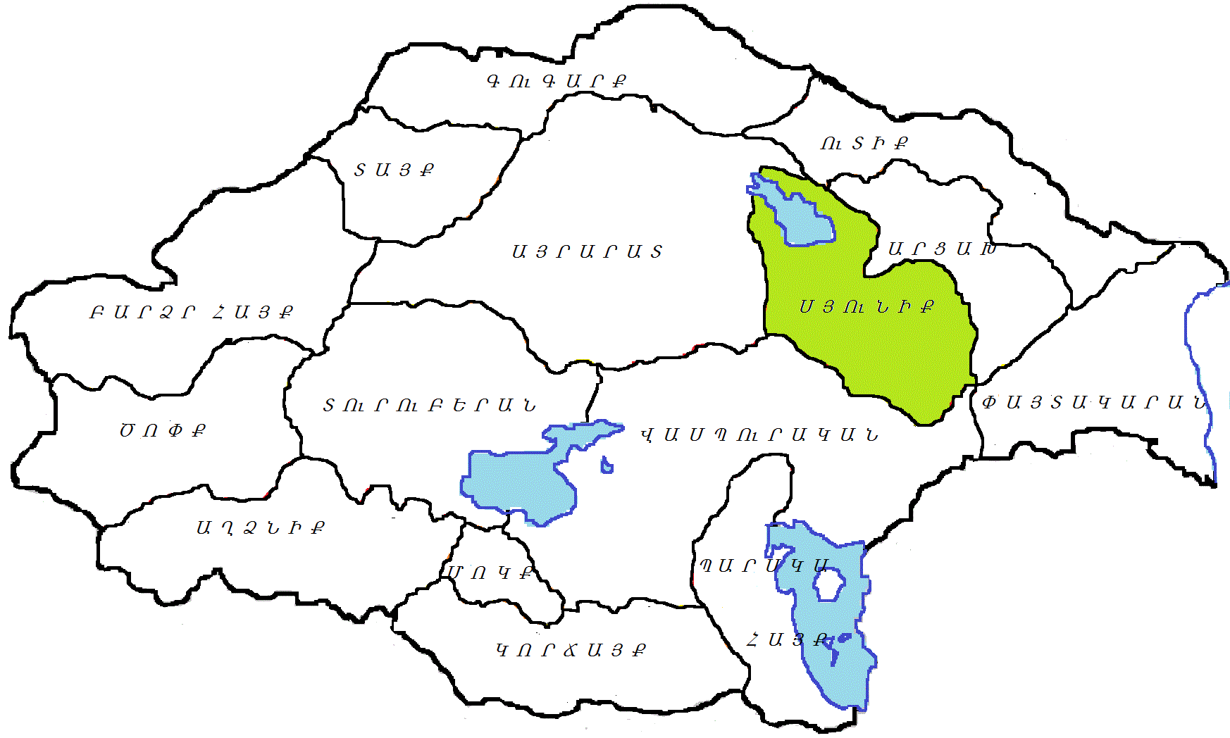 Սյունիք նահանգ, Մեծ Հայք